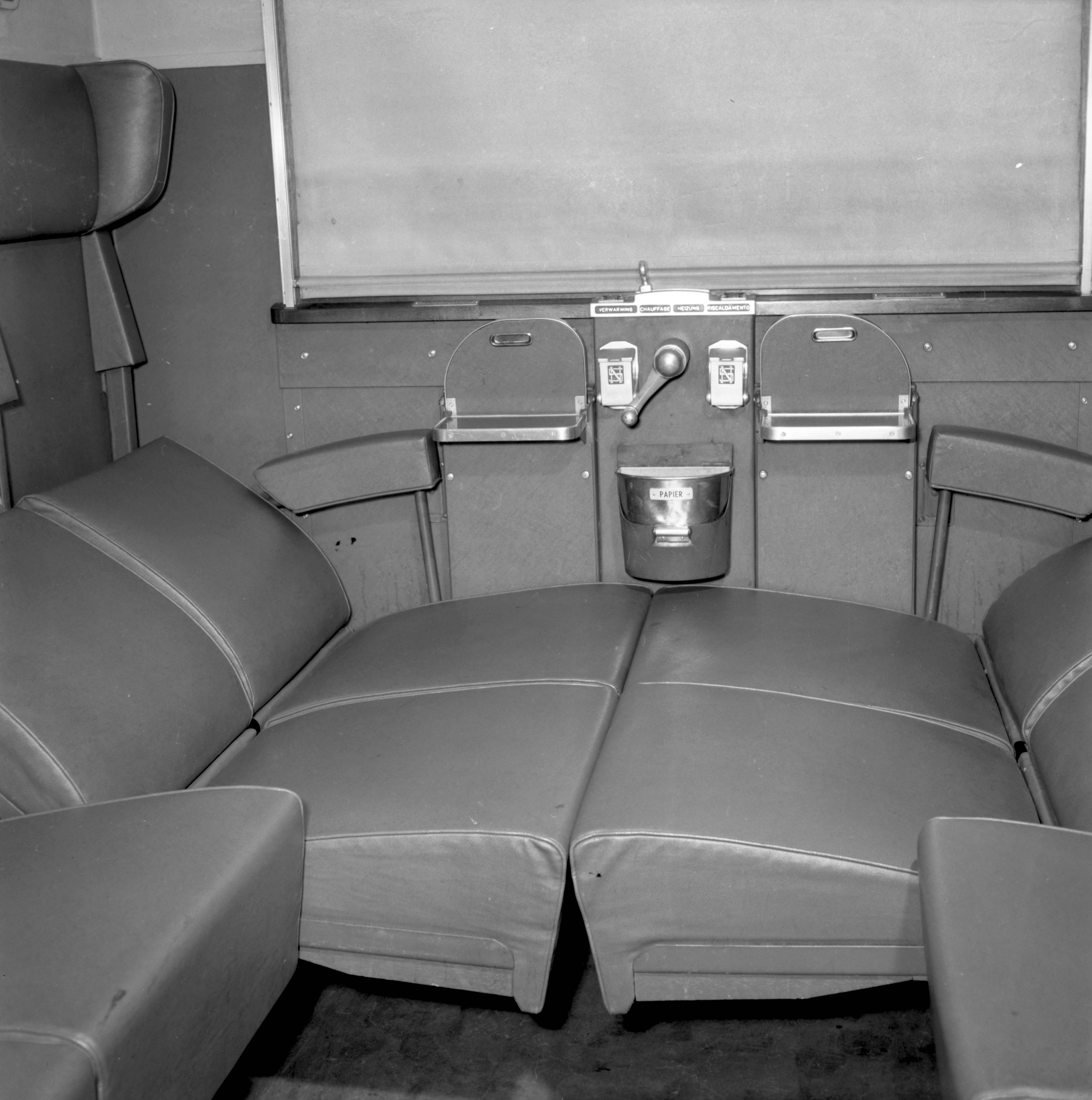 Interieur 2e klasse van het rijtuig nr. AB 7378 (plan K, serie AB 7351-7380) van de N.S. te Amsterdam.